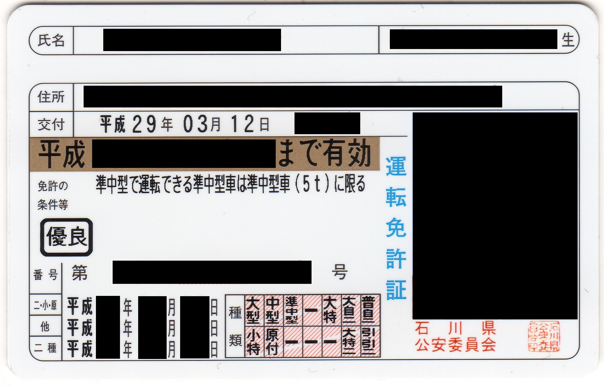 投稿者のものをスキャンし個人情報を黒塗りに。